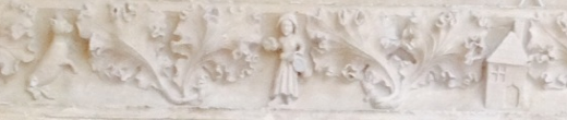 Figurines sculptées du Petit Chaperon Rouge se trouvant au palais Jacques Coeur, à Bourges (France) - XVeme siècle.